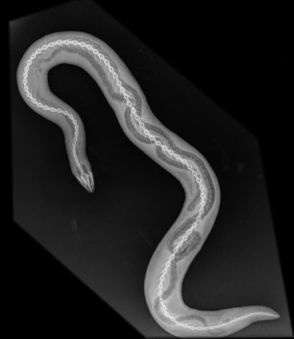 Röntgenbild einer Schwimmwühle